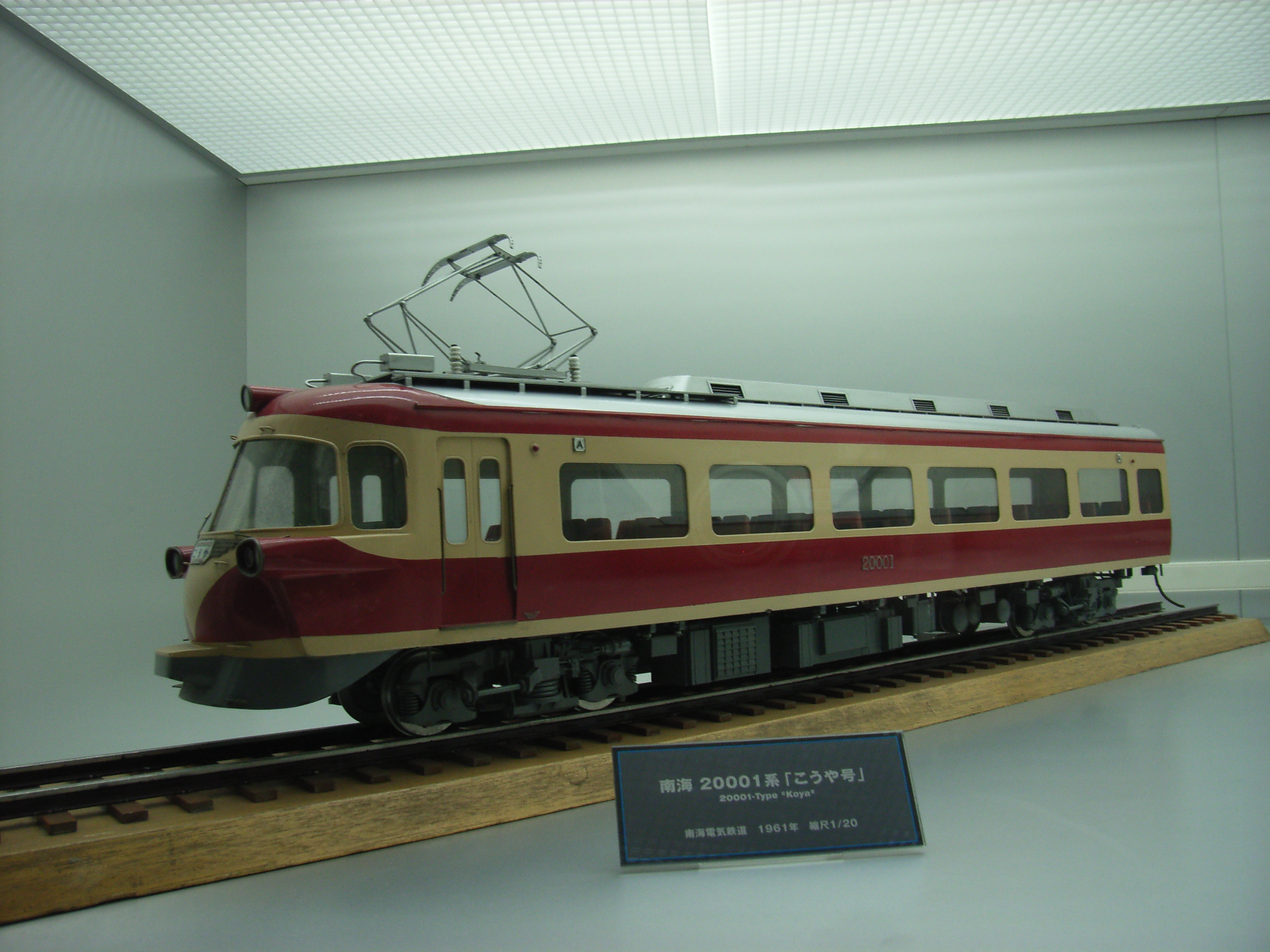 南海電気鉄道20001系（旧こうや号) 旧交通科学博物館に展示されていた1/20の模型